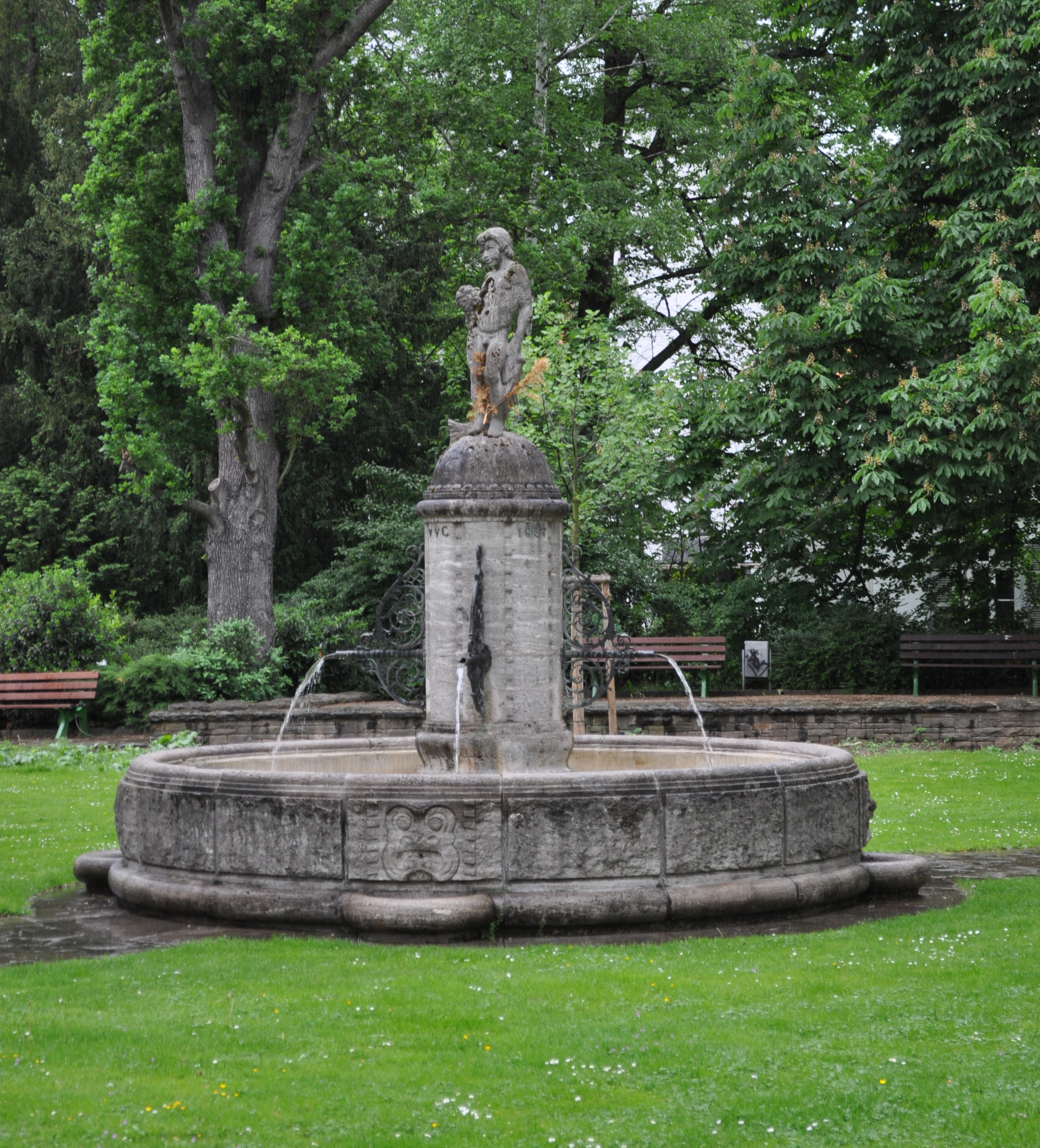 Brunnen zwischen Denglerstraße und Beethovenallee, Bad Godesberg